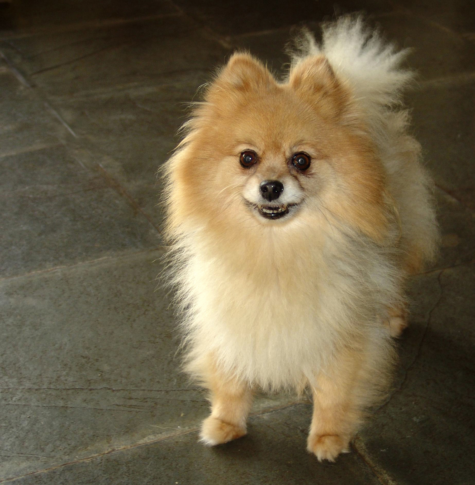 Spitz Alemão Anão (Lulu da Pomerânia), do Canil Love Blue (Love Blue Kennel), (Avaré, São Paulo, Brasil)